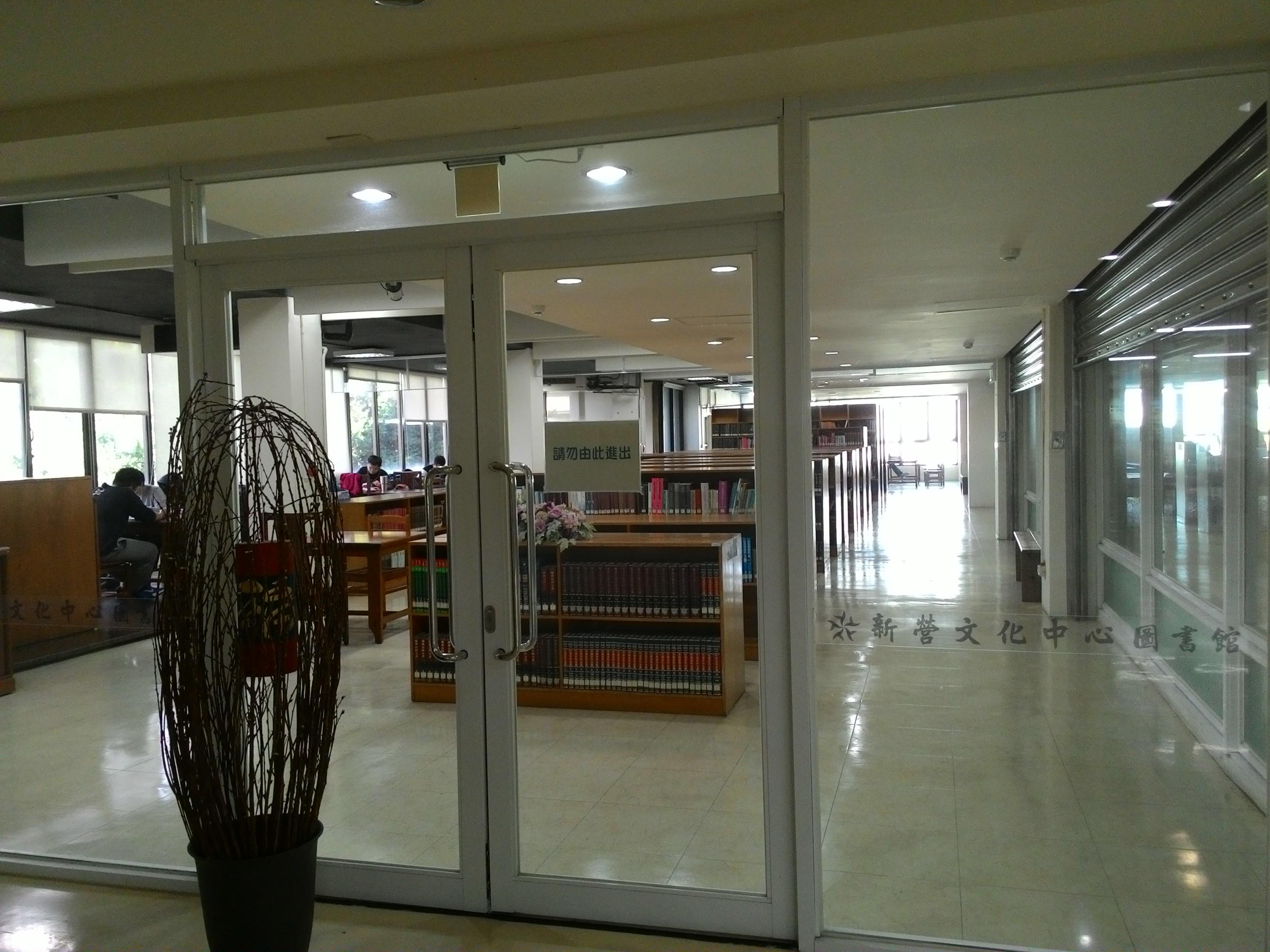 臺南市新營文化中心圖書館